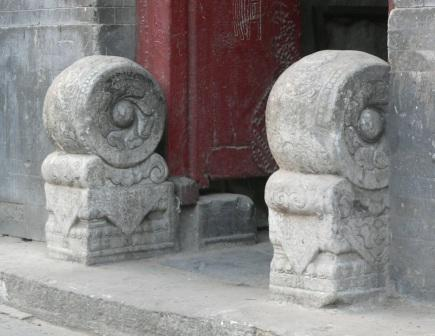 抱鼓形门墩 2005年2月12日拍摄